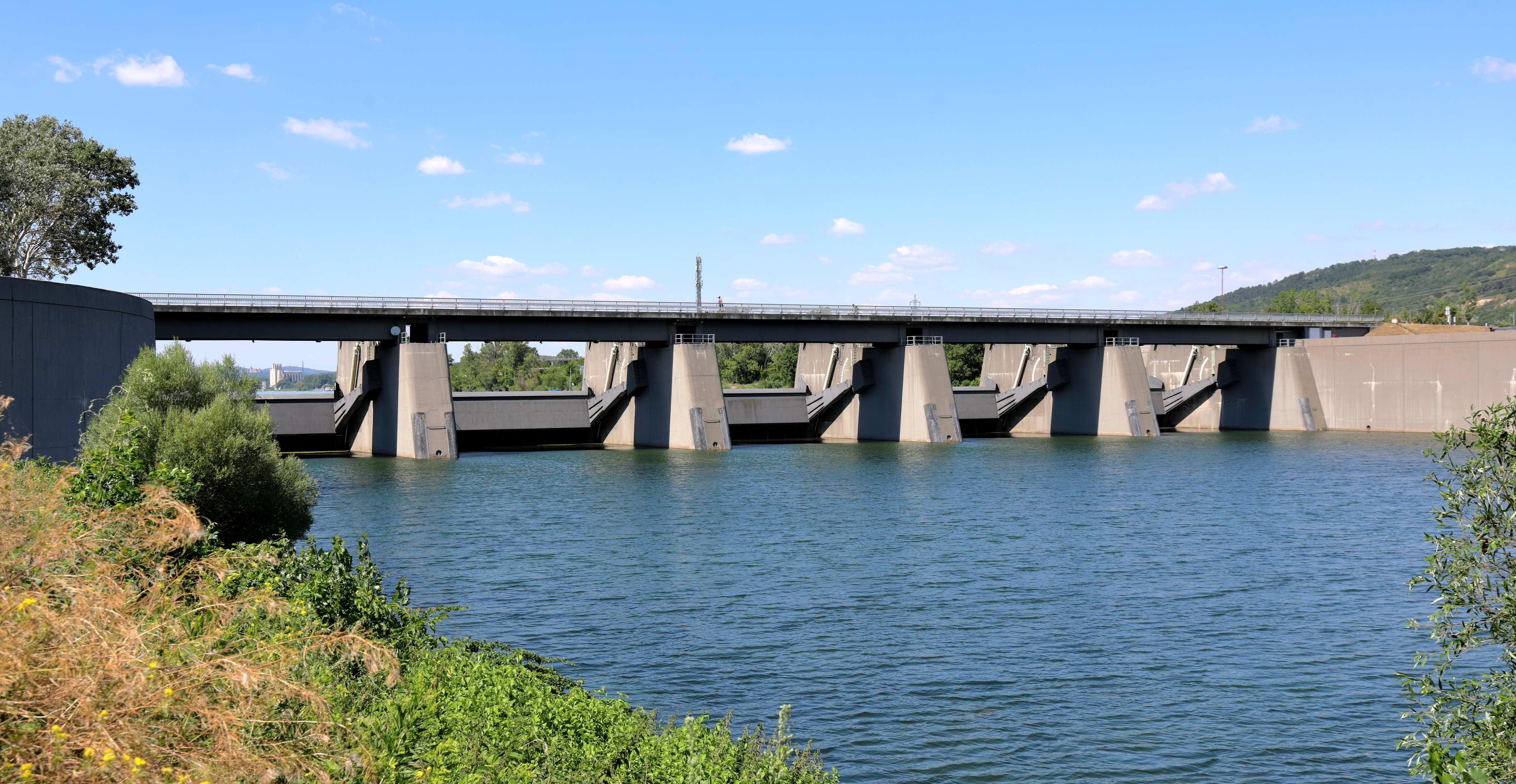 Das Einlaufbauwerk der Neuen Donau (Entlasstungsgerinne) nördlich von Wien.Das Bauwerk mit fünf je 24 Metern breiten Wehrfelder befindet sich großteils auf Klosterneuburger Gemeindegebiet und zu einem kleinen Teil auf dem Gemeindegebiet von Langenzersdorf. Gebaut wurde das Einlaufbauwerk 1975 im Zuge der Wiener Donauregulierung gemeinsam mit der Neuen Donau und der Donauinsel.